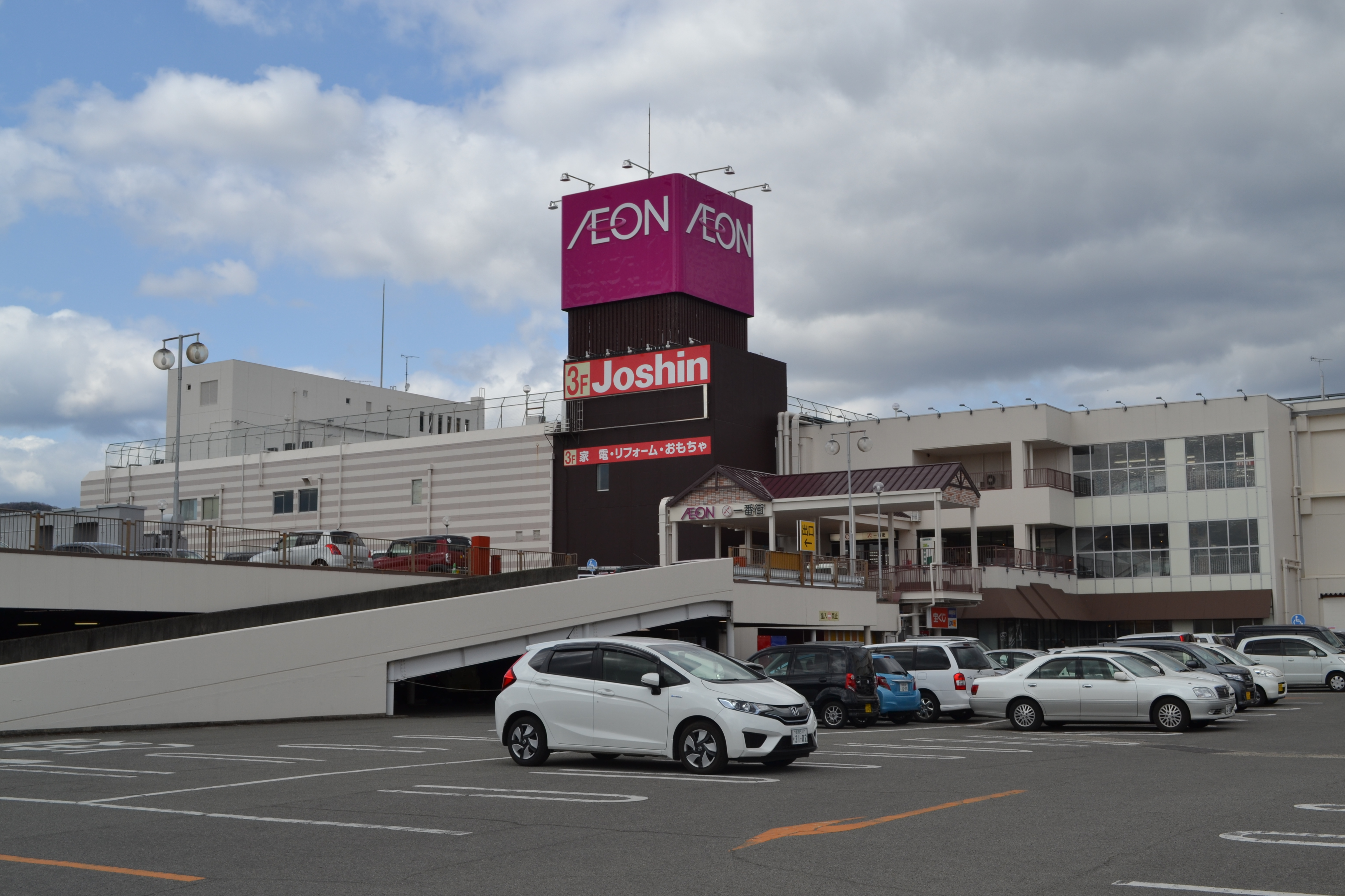 2016年3月25日改装OPENしたイオン竜野店(元ダイエー竜野店